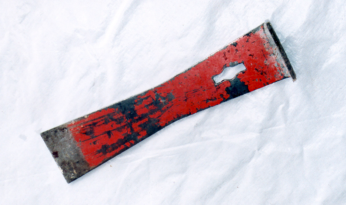 Stockmeißel, Sommer 2004